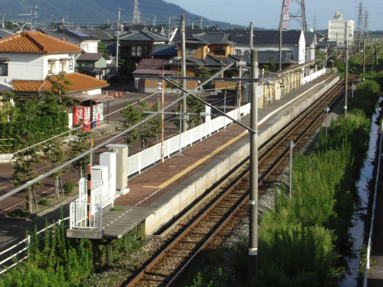 北吉田駅プラットホーム